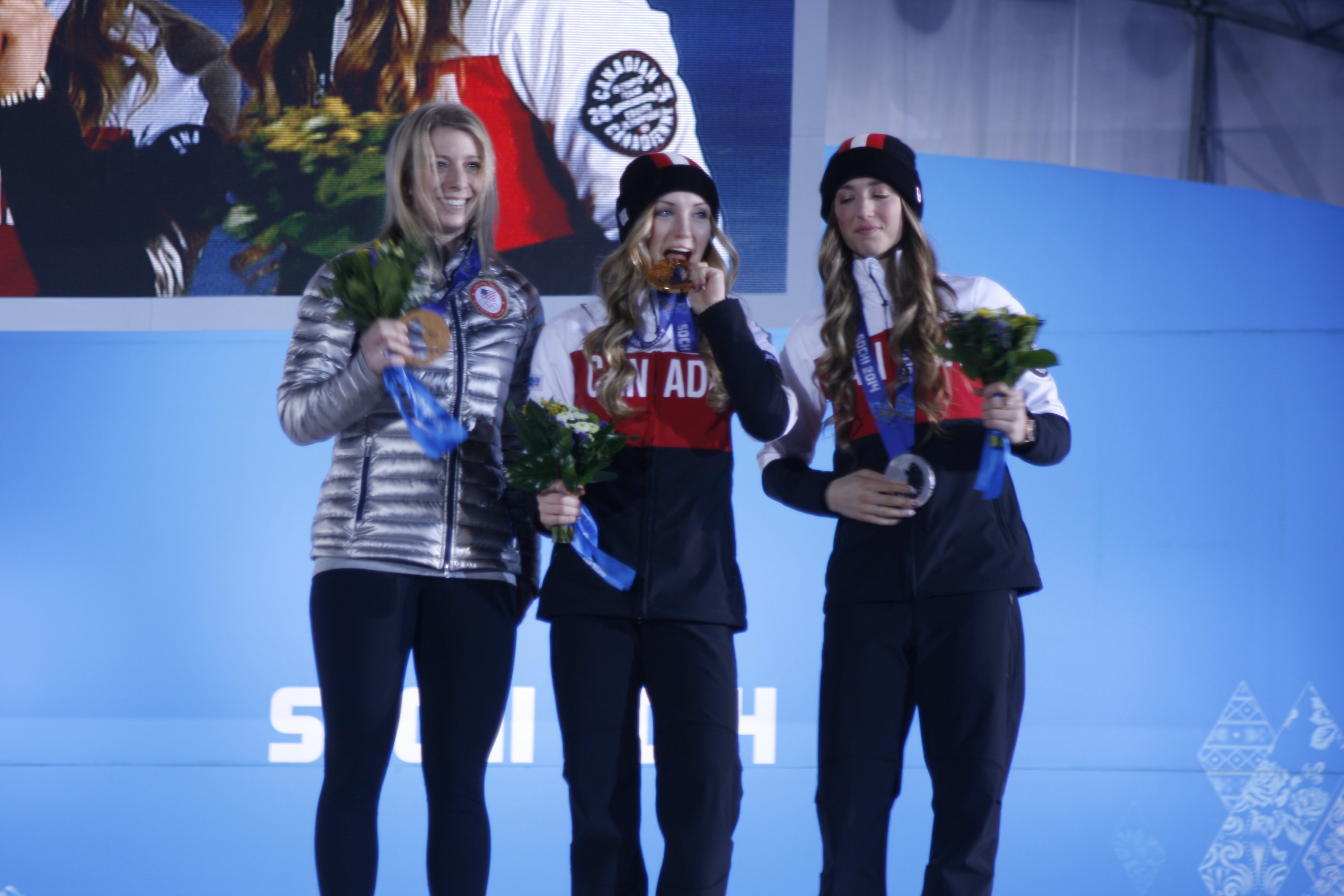 Церемония награждения победителей в соревнования по могулу на Зимних олимпийских играх 2014 в Сочи